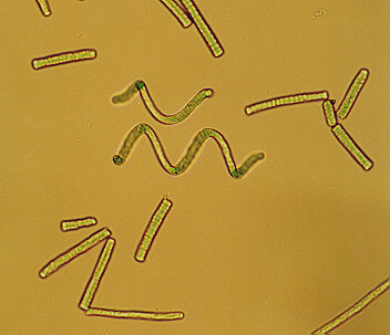 Spirulina